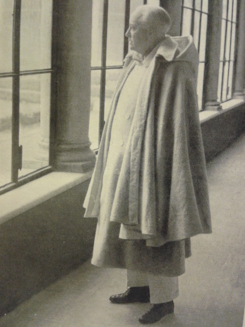 Uno degli ultimi ritratti di Vittorio Putti, Augusto Anzoletti, Alessandro Codivilla e Vittorio Putti nel ricordo di un loro contemporaneo, Cappelli editore, Rocca San Casciano, 1954, 133 pagine